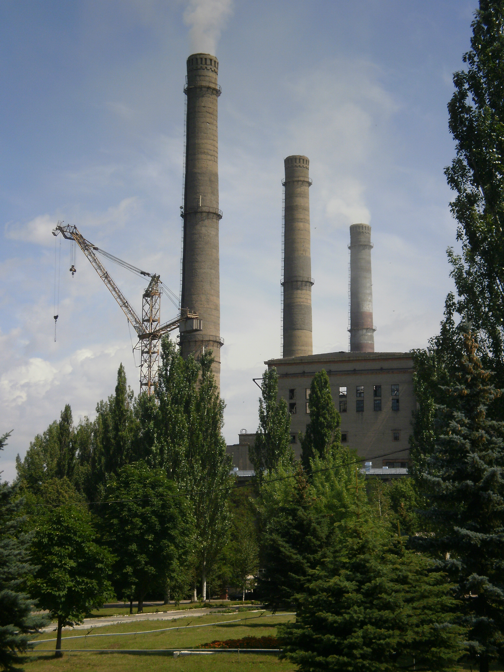 пгт Мироновский Донецкой области